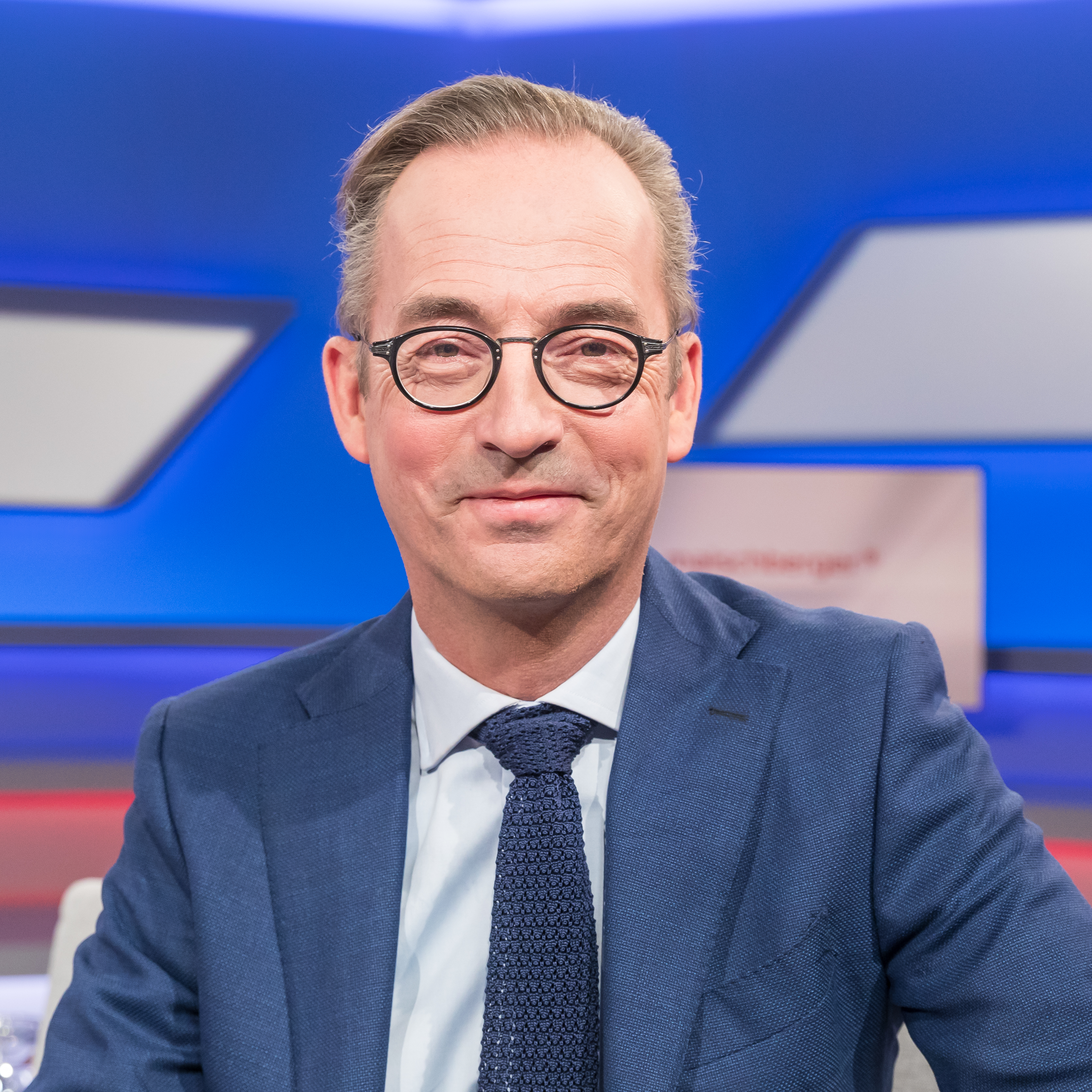 MAISCHBERGER am 27. Februar 2019 in Köln. Produziert vom WDR. Thema der Sendung: „Rettet die Biene, schützt den Wolf: Was ist uns der Naturschutz wert?“ Foto: Jan Fleischhauer, „Spiegel“-Autor